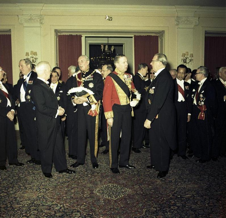 Neujahrsempfang 1961 in der Redoute, Bad Godesberg